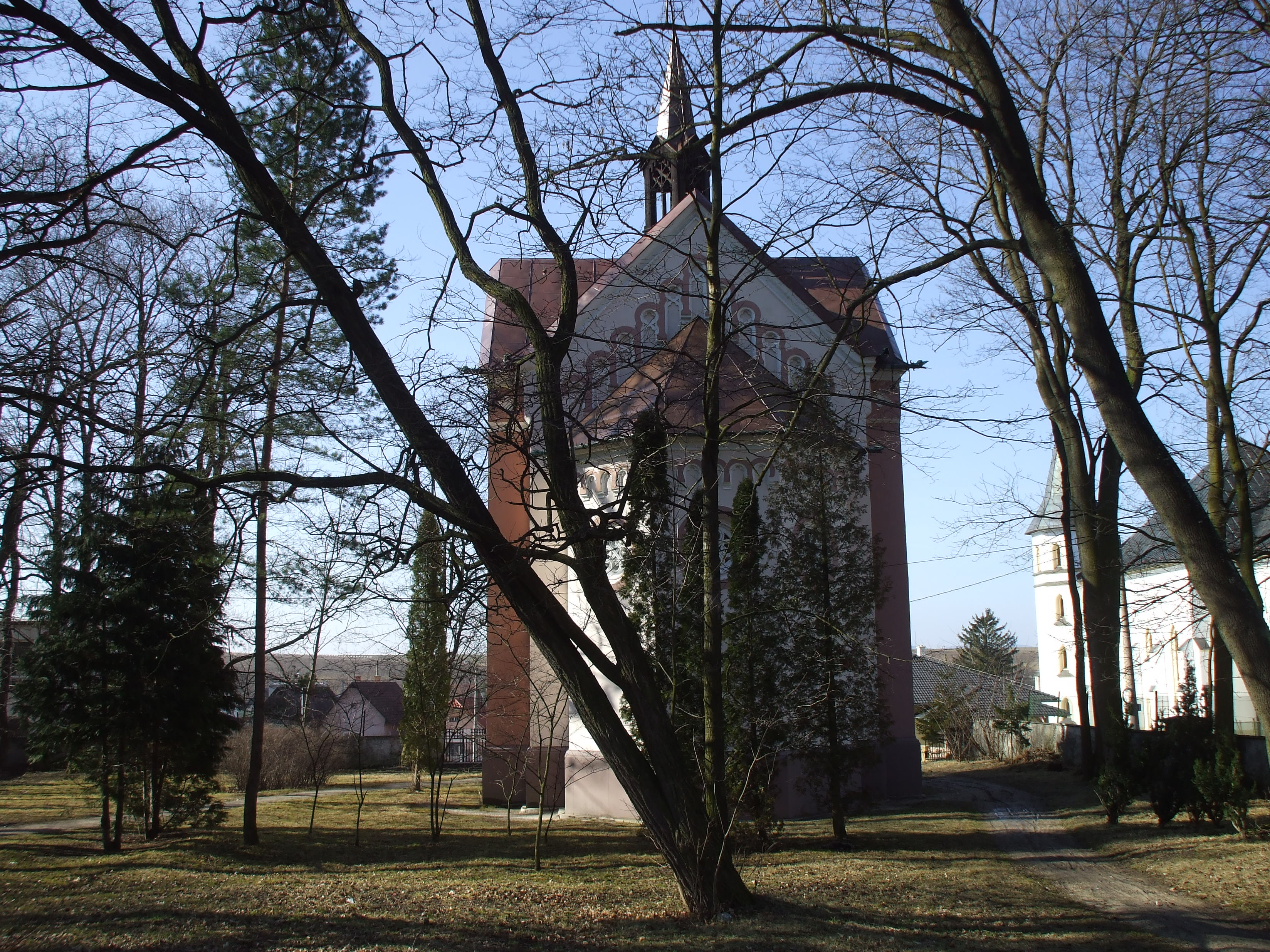 Neogotická kaplnka v Mošovciach